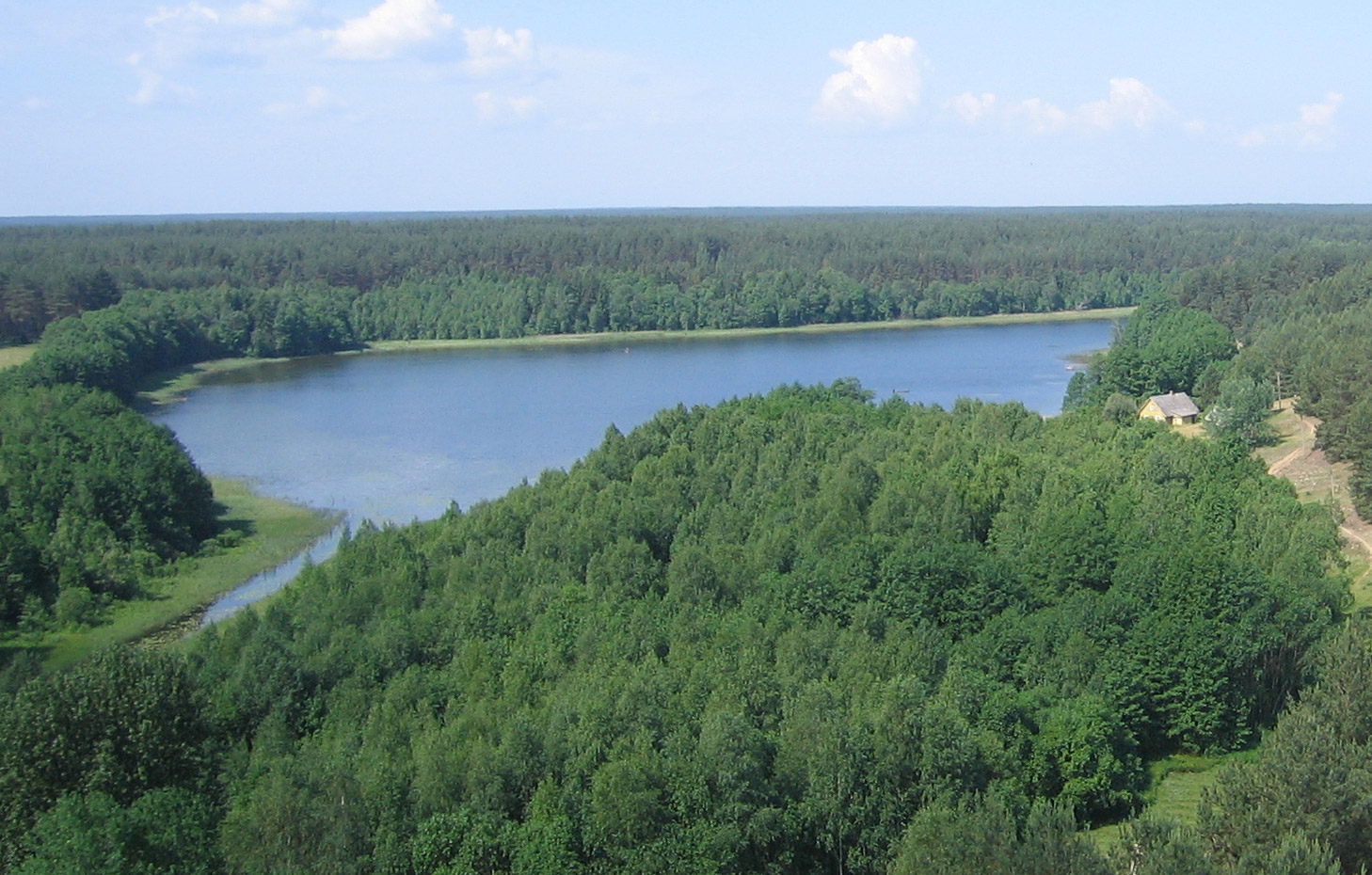 Kauknorėlis lake